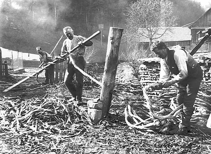 Karl Blumenthal: Flößer beim Wiedmachen bei der Engen Brücke.